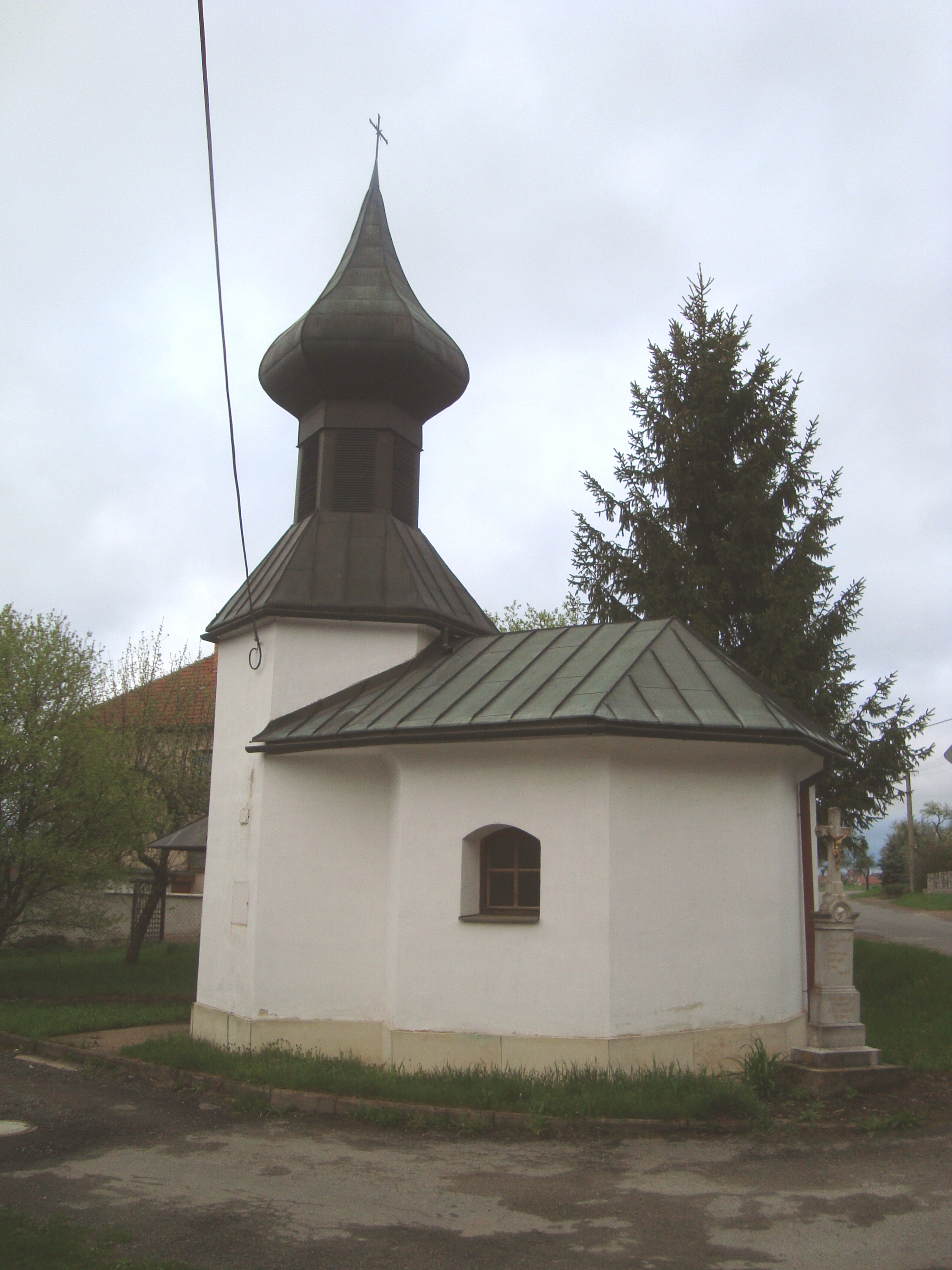 Křižínkov, kaple svaté Anny